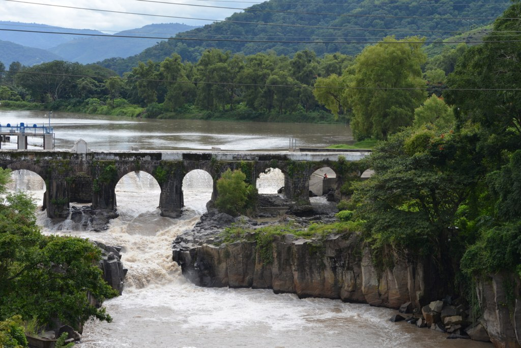 Puente Los Esclavos, Old Bridge in Guatemala